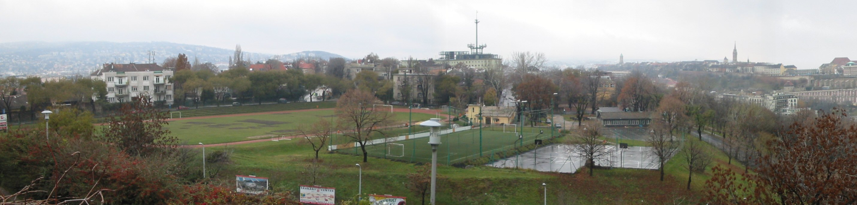 Sportpálya a Naphegyen, panorámakép (Budapest I.)